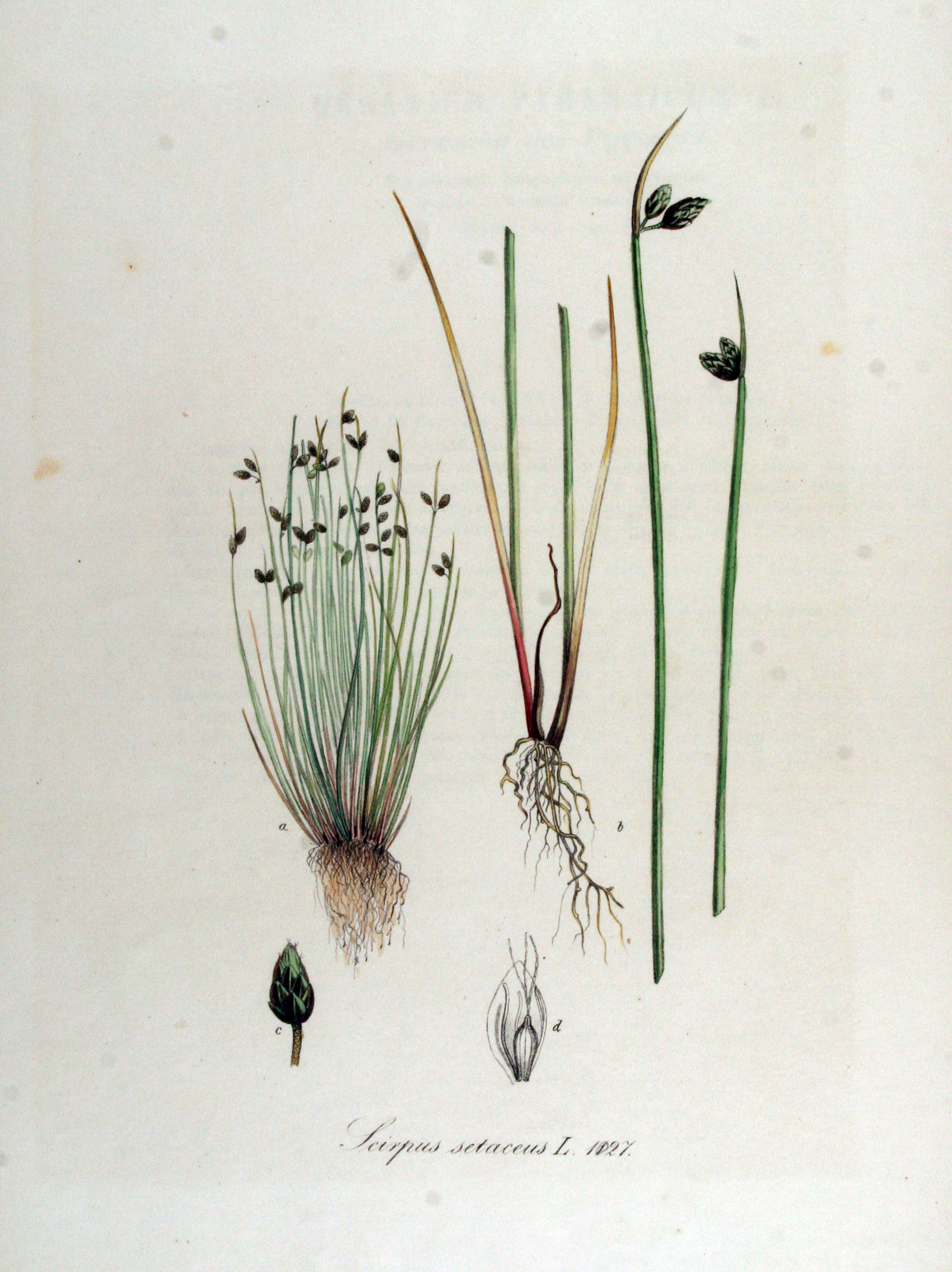 Isolepis setacea (L.) R. Brown (Syn. Scirpus setaceus L.)